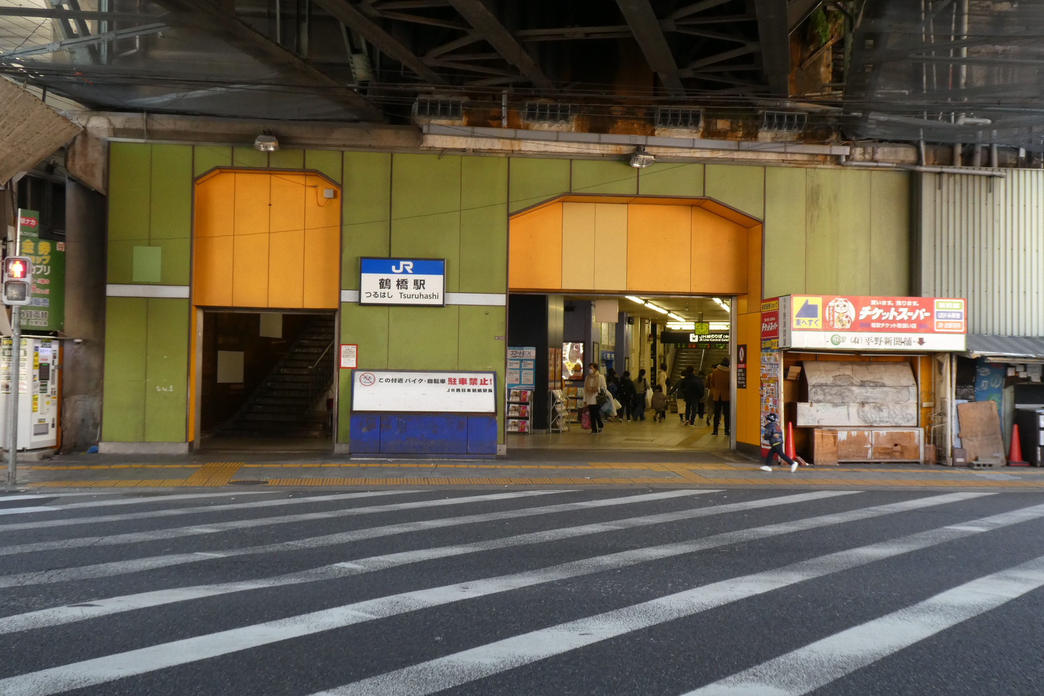 大阪環状線 鶴橋駅 中央口。千日前通に面している。